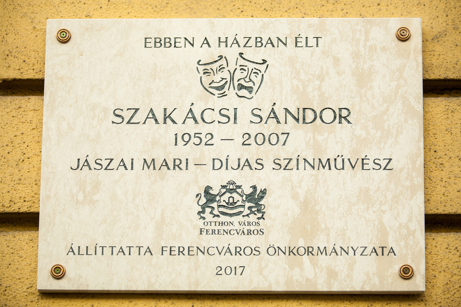 Szakácsi Sándor színművész emléktáblája a IX. kerületben a Boráros tér 2. szám alatt